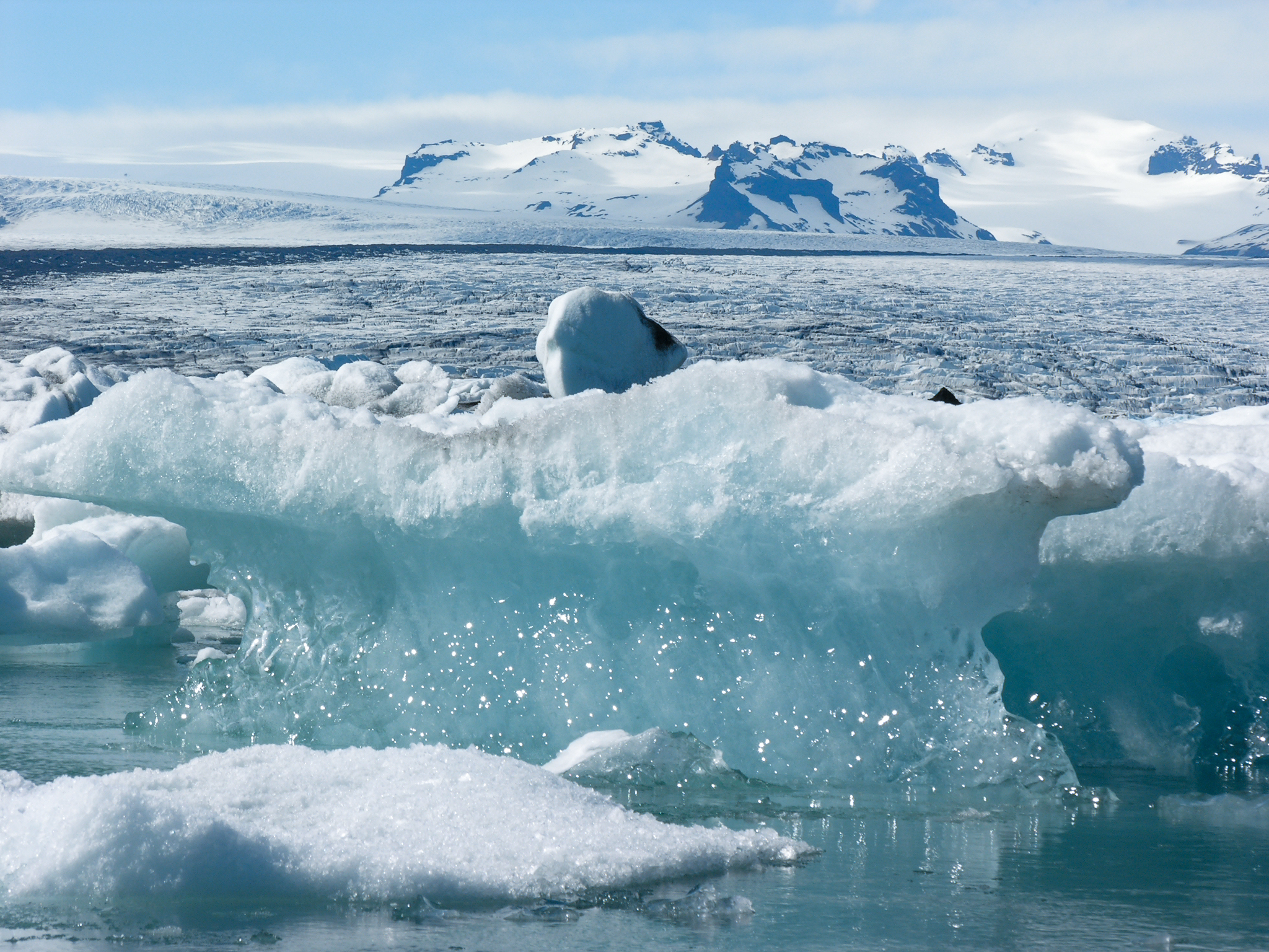 Iceland, Jökulsárlón